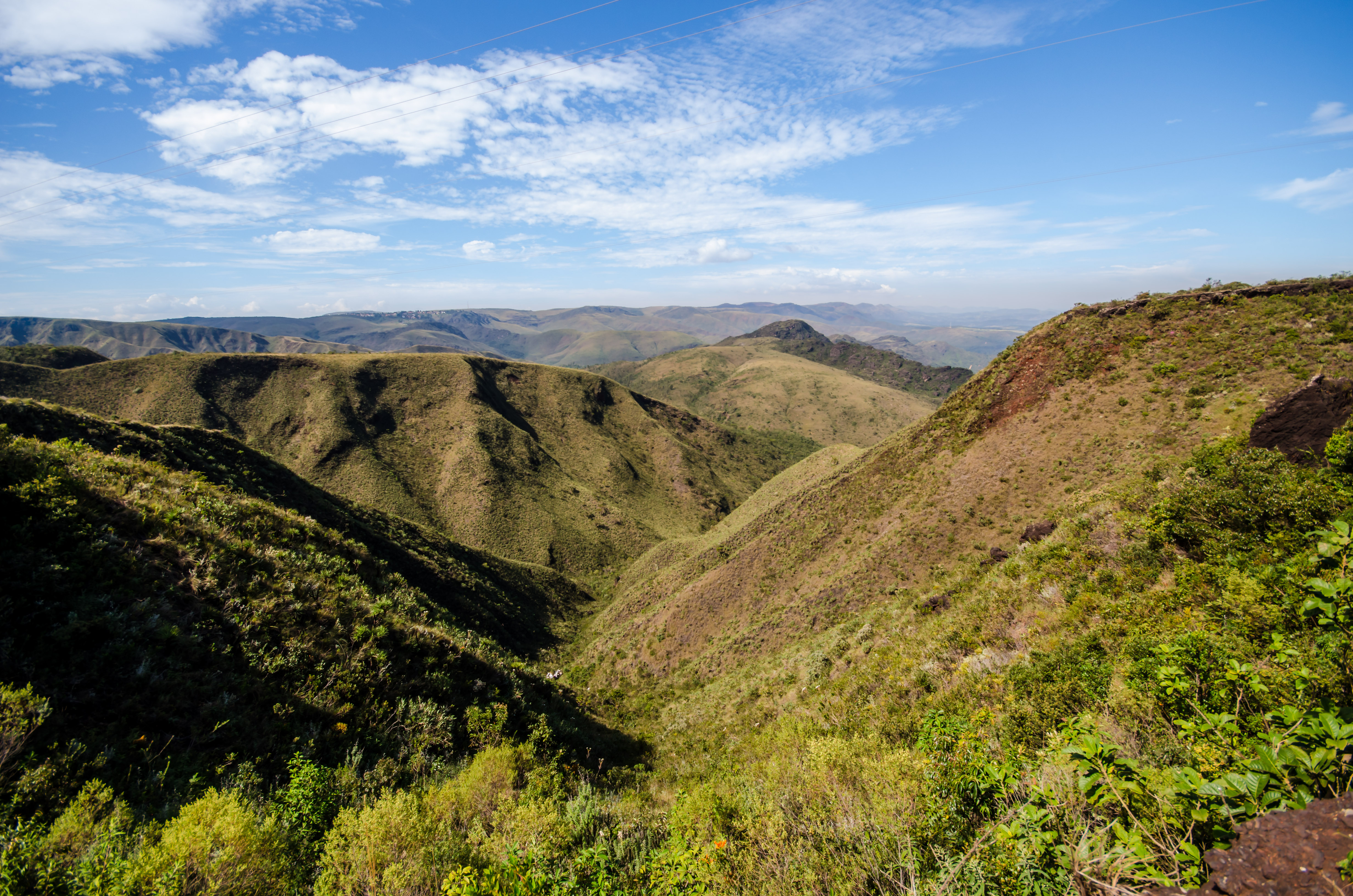 Paisagem da Serra do Rola Moça.